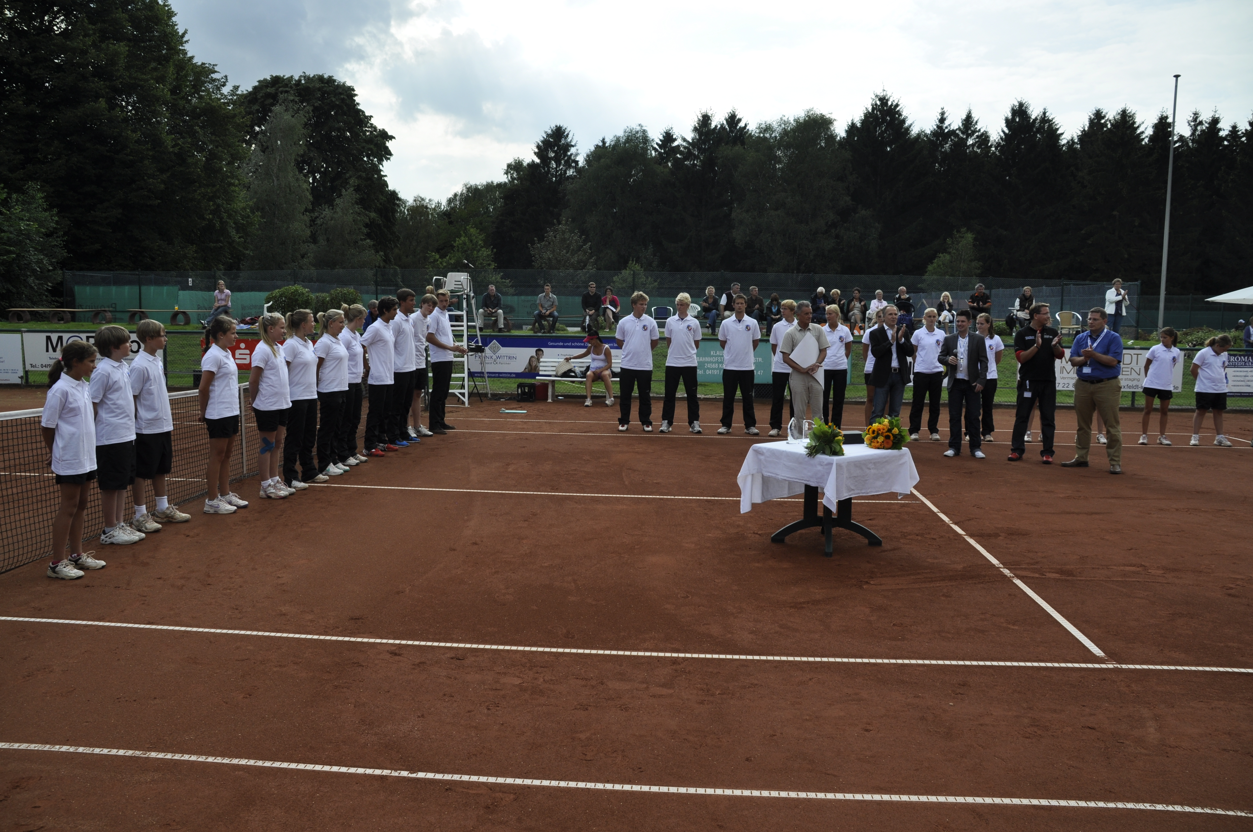 Tennis Sieger Siegerehrung Horst Schröder Pokal 2011